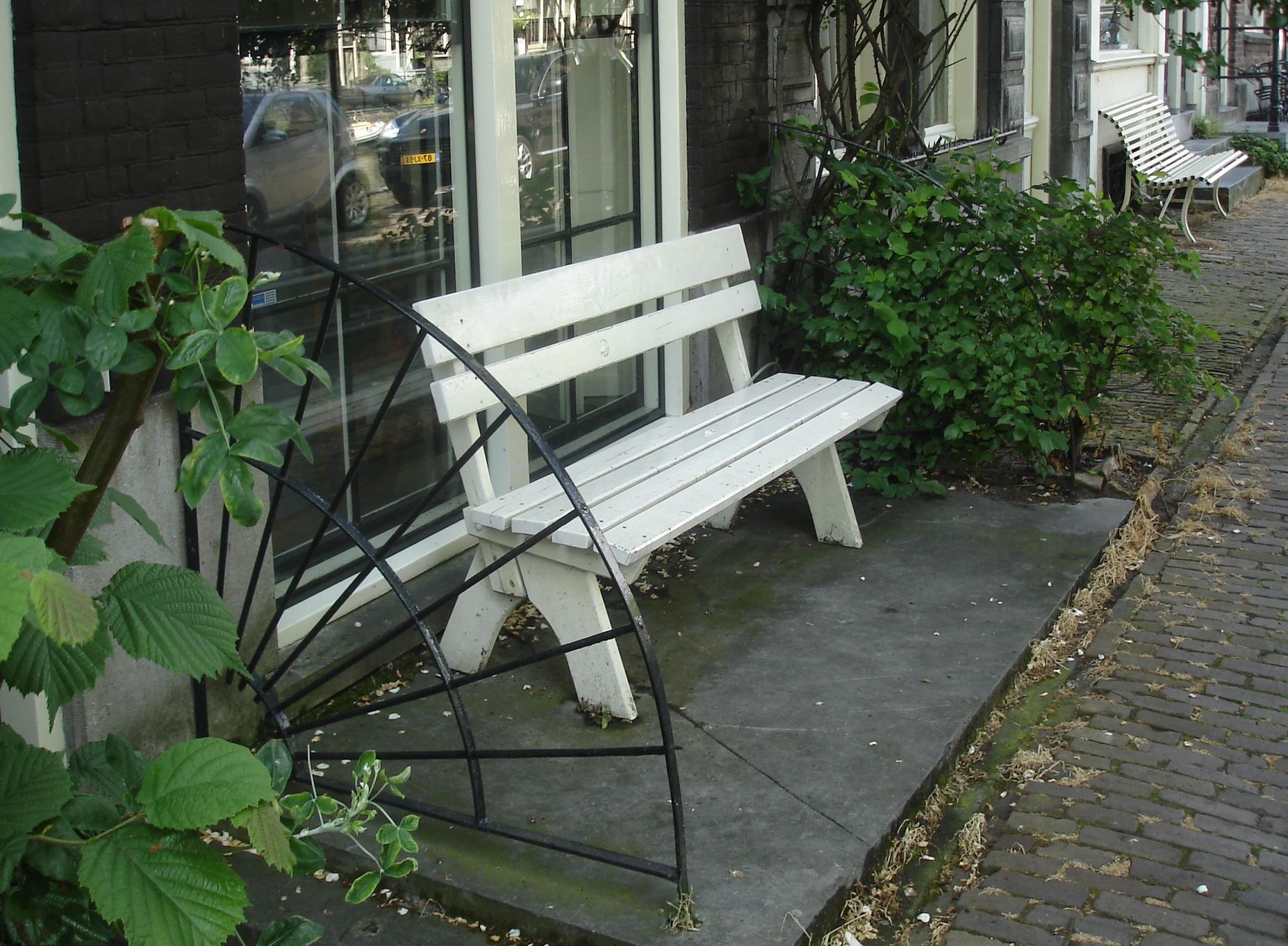 Bancă de lemn, fotografiată în Olanda în 2008